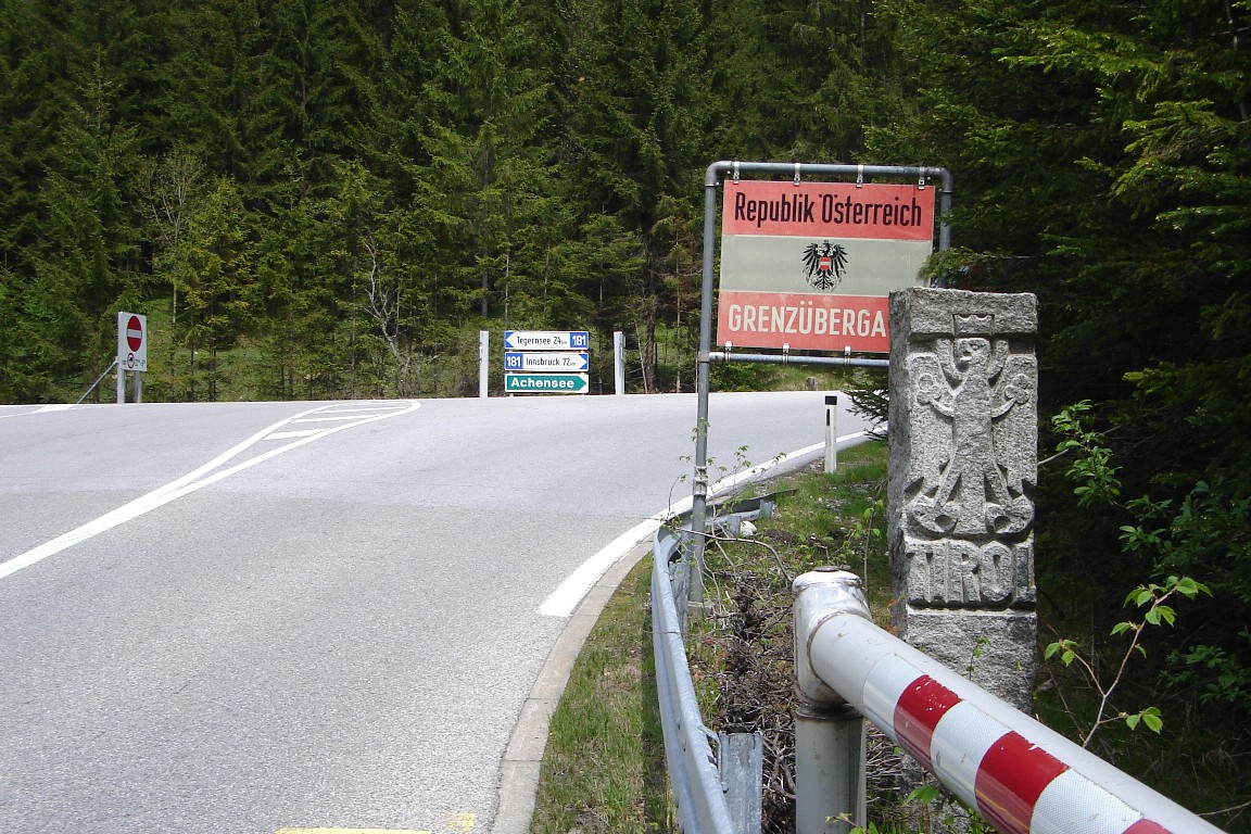 Paso entre Alemania y Austria Border crossing between Germany and Austria on German Federal route B307. The red-and-white sign in the foreground says "Republic of Austria - Border crossing"; in front of it is the boundary marker of the Austrian Federal State of Tyrol.